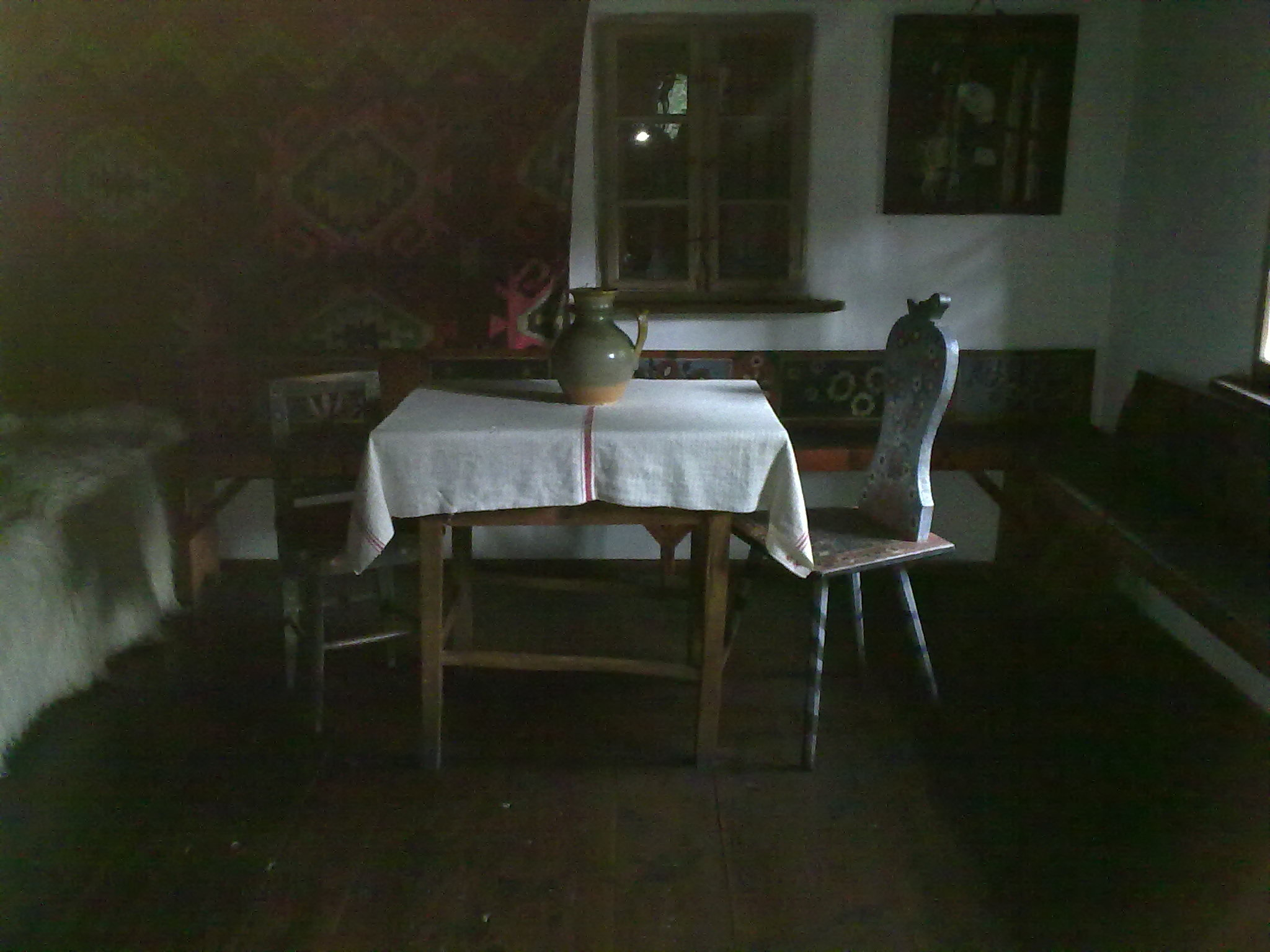 Parcul etnografic Bran